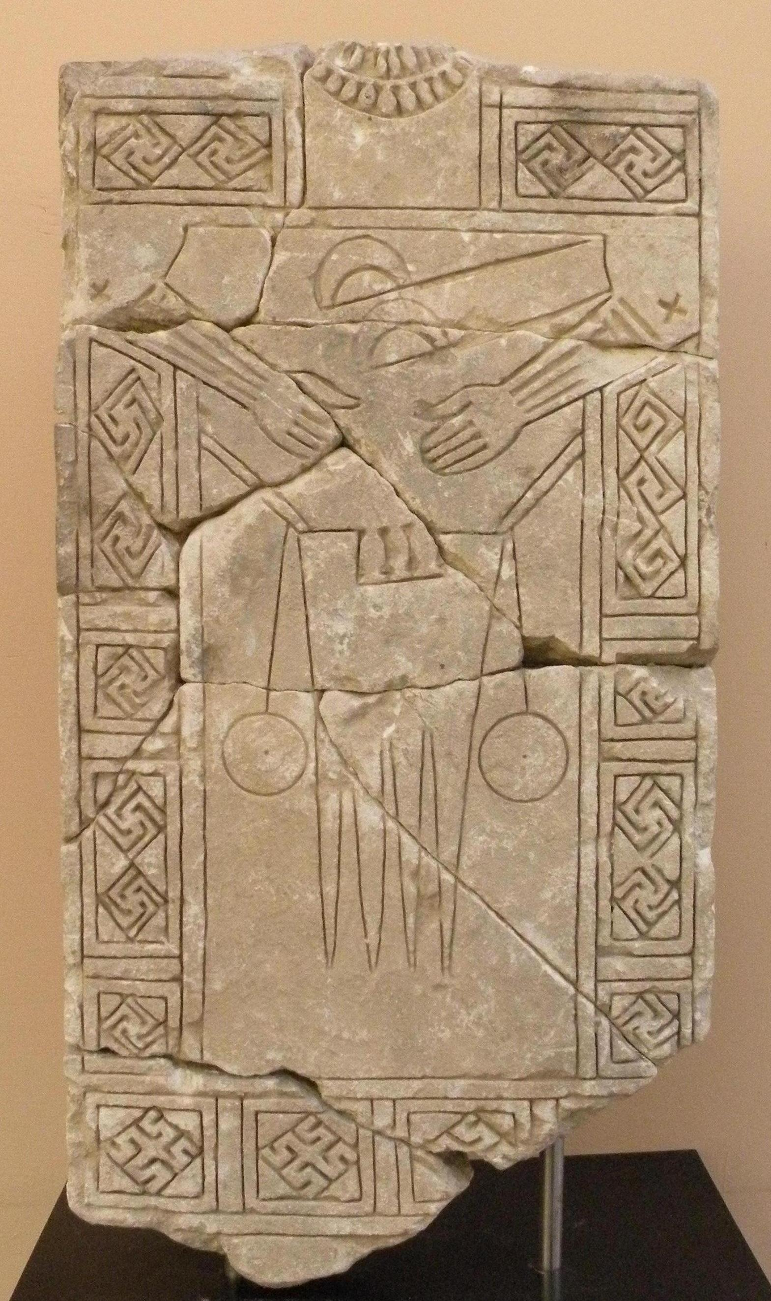 Stèle anthropomorphe en calcaire à décor gravé. Civilisation daunienne (610-550). Musée de Mariemont.